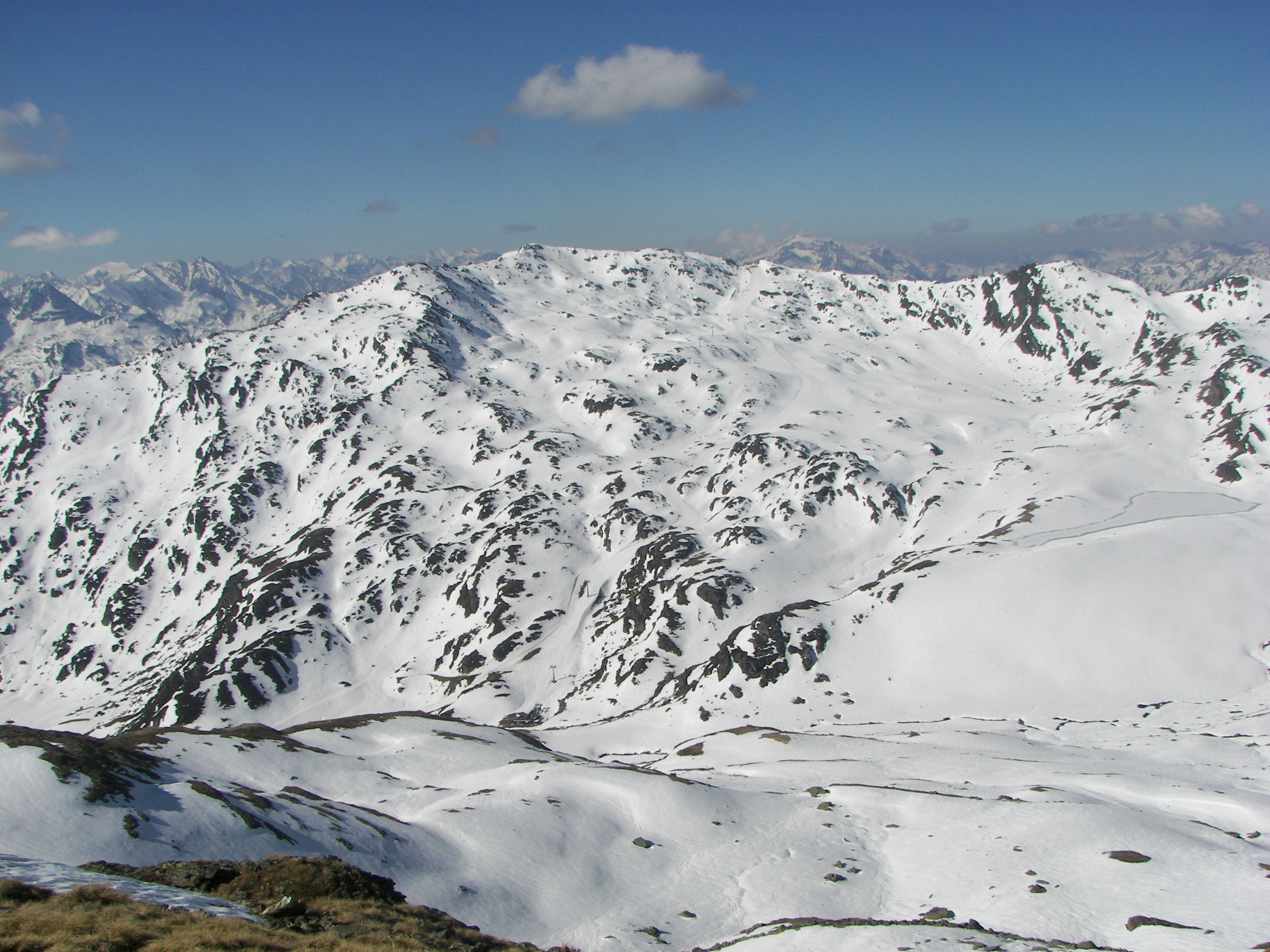 Nordwesthang des Kreuzjoch vom Torhelm aus gesehen